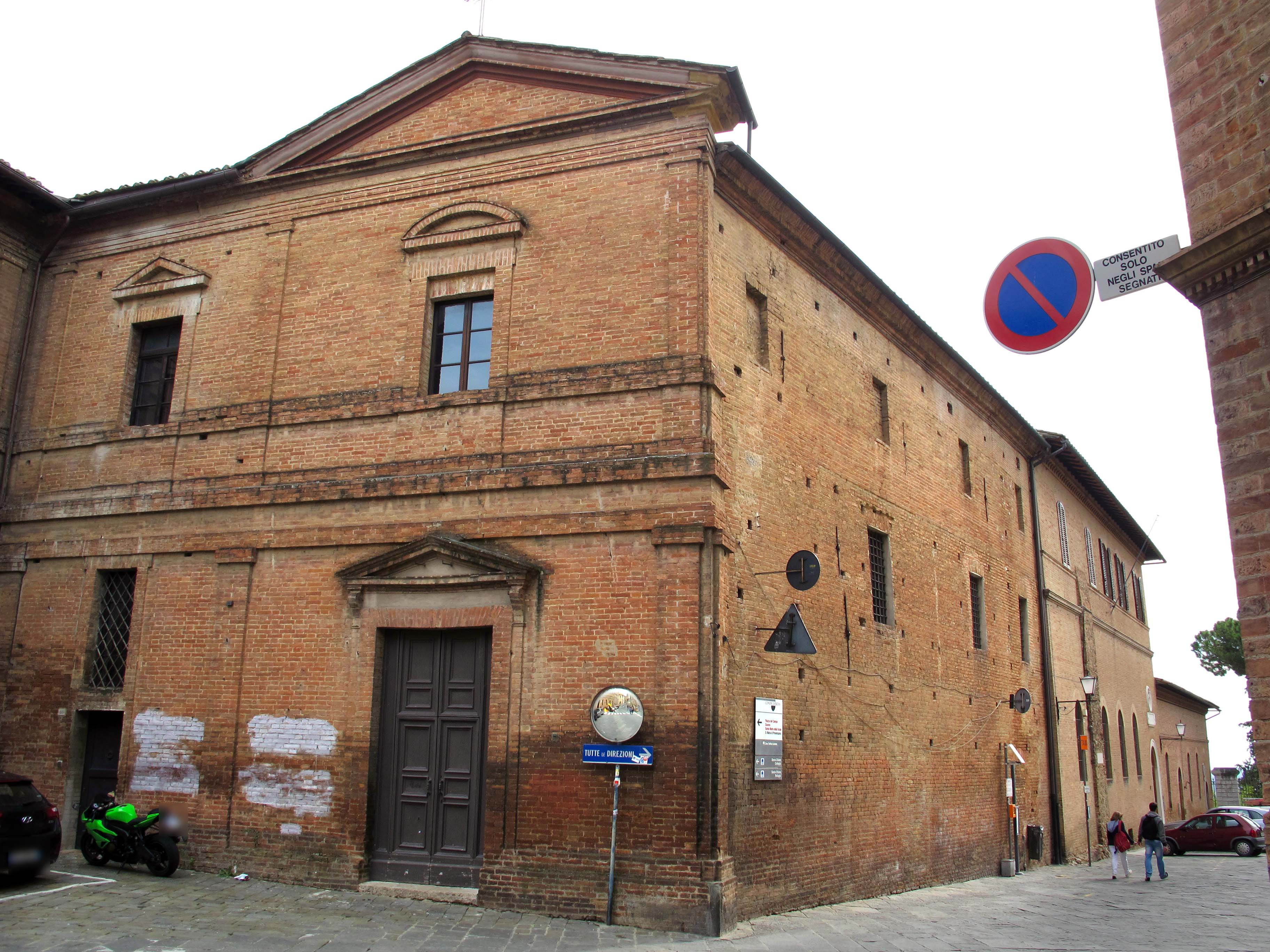 Siena